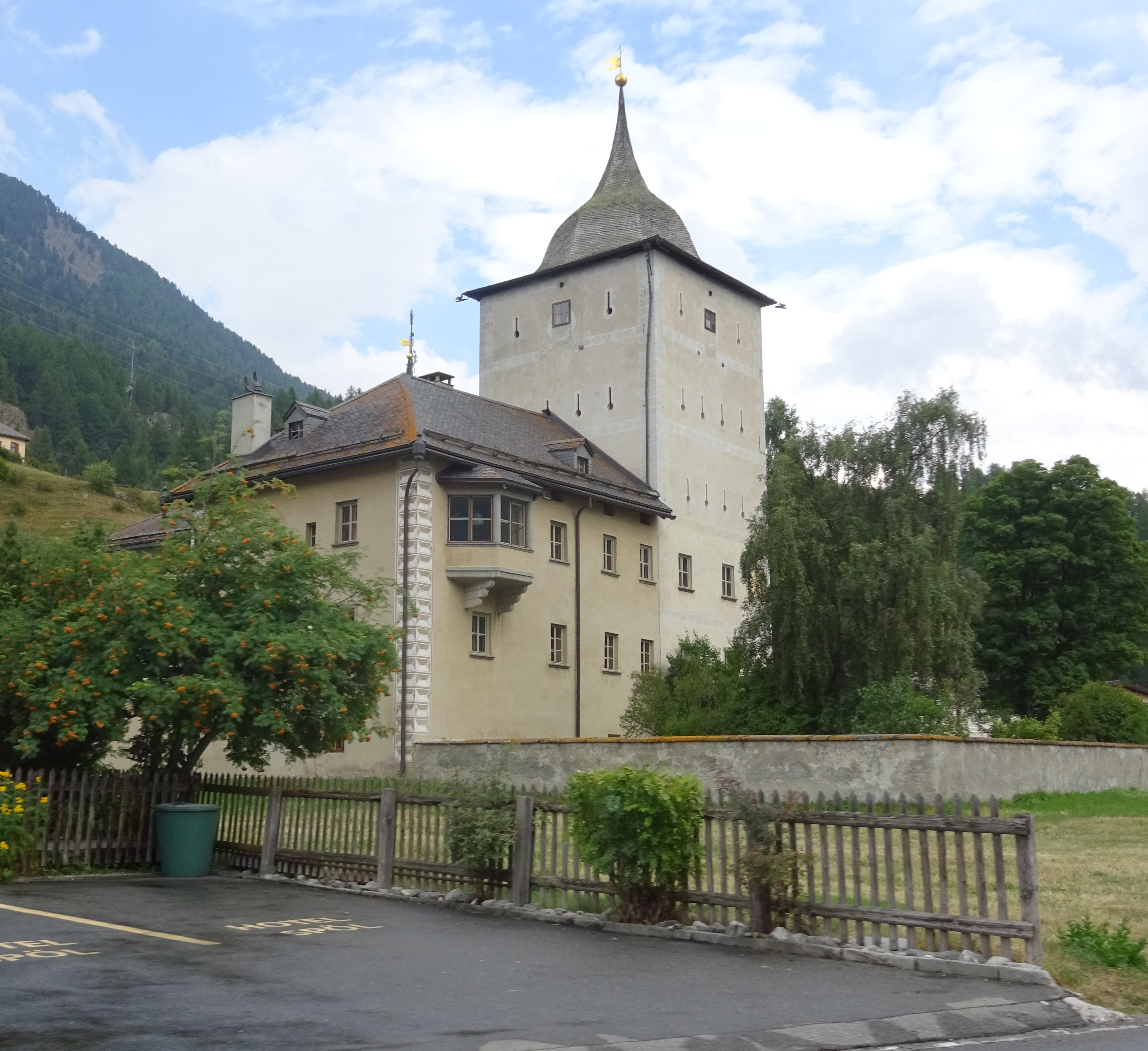 Castello Planta-Wildenberg, Zernez, agosto 2015